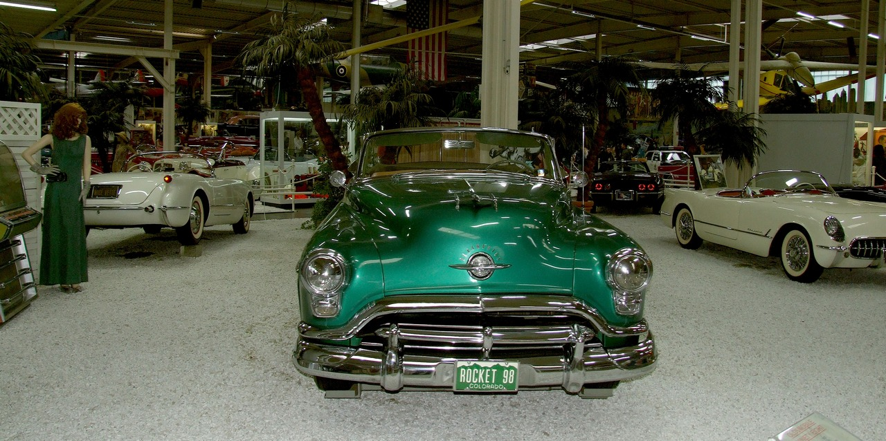 Der Oldsmobile Ninety-Eight war 1952 das längste Auto auf amerikanischen Strassen.